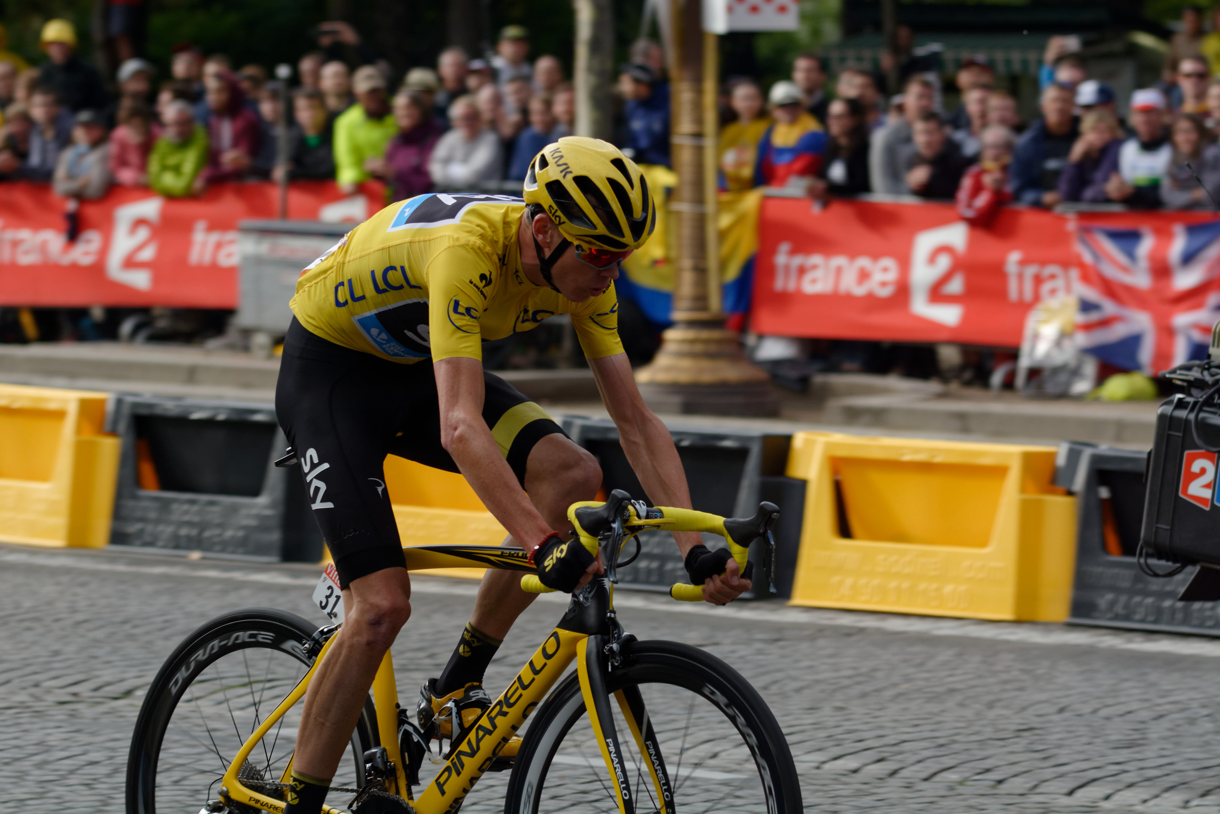 D71_3248_DxO